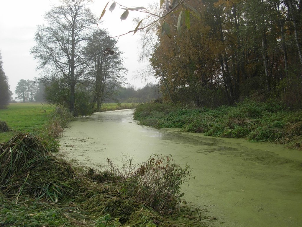 Kanał Notecki w pobliżu rezerwatu przyrody "Dziki Ostrów"